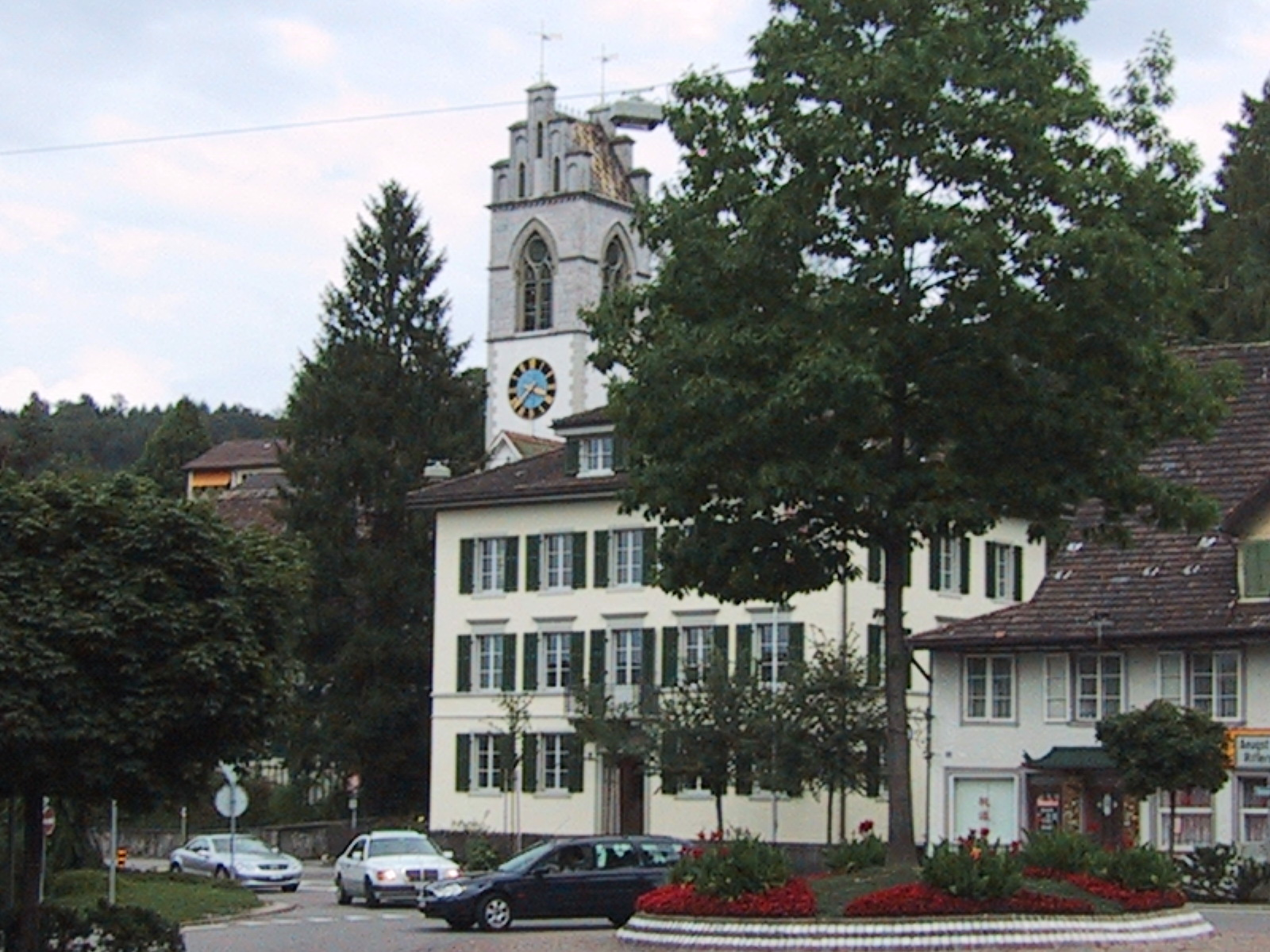 Affoltern am Albis, Kanton Zürich